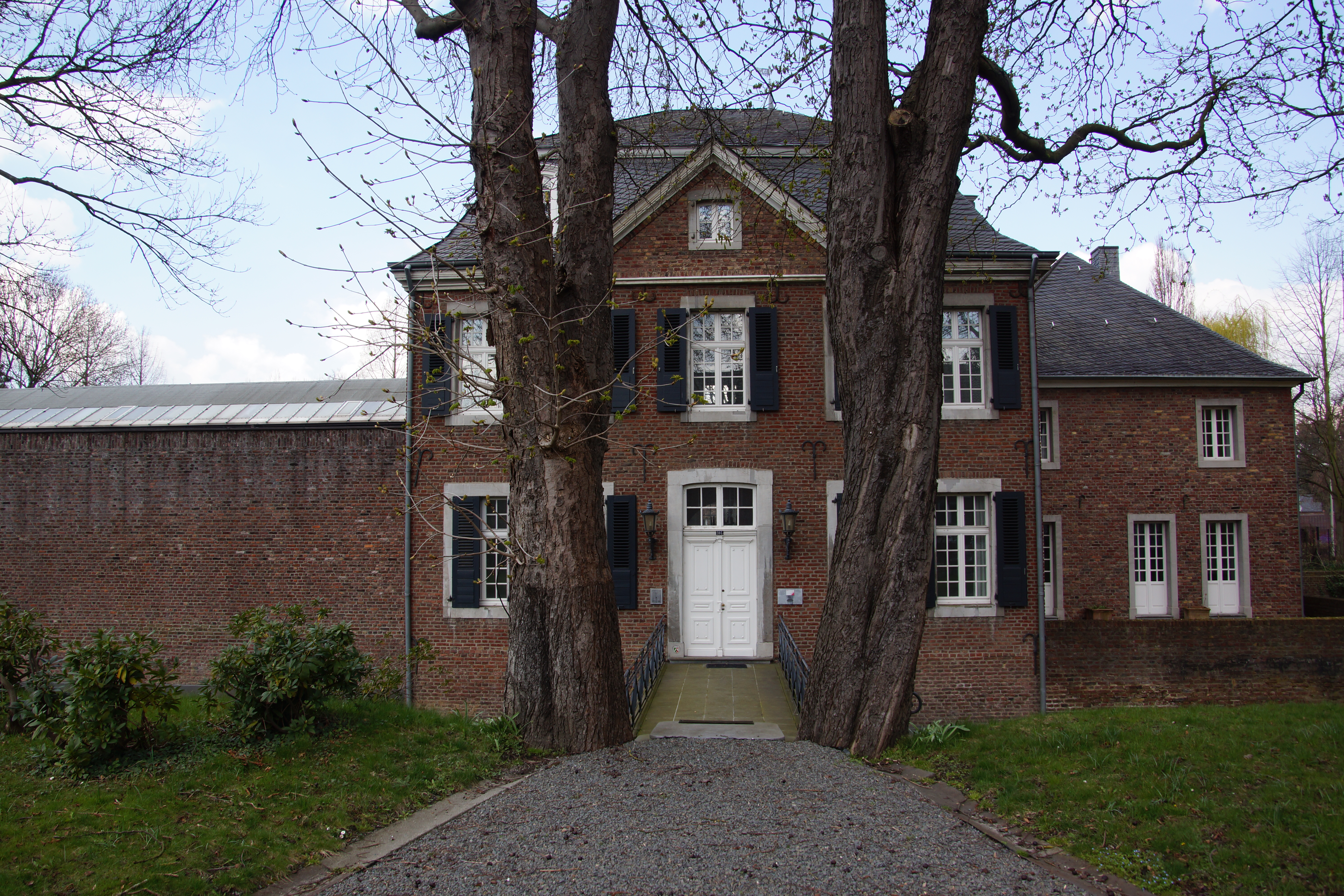 Haus Bitz in Frechen-Bachem